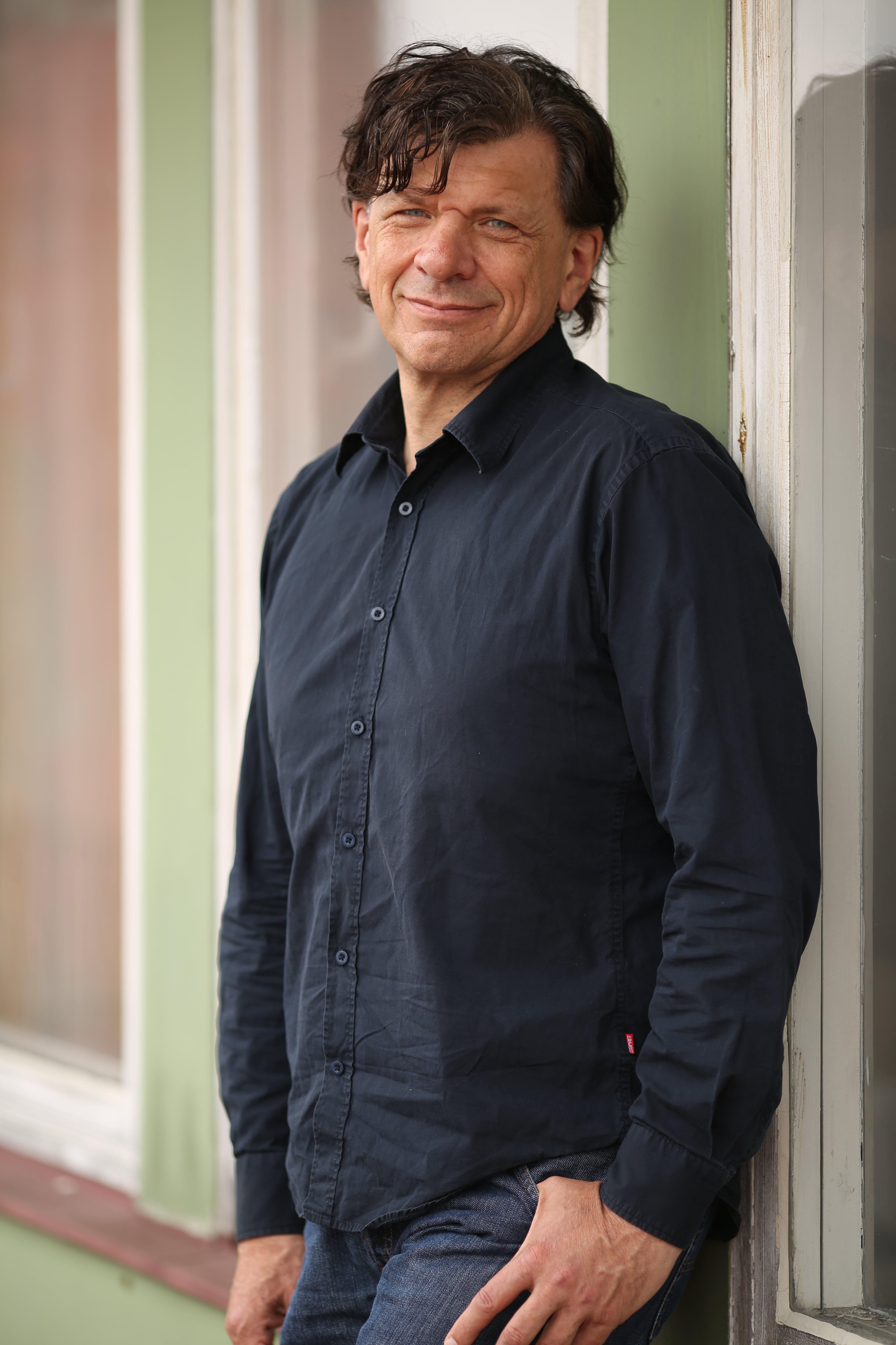 Autorenfoto Ottmar Neuburger, Fotografin: Tina Neuburger, Simbach am Inn